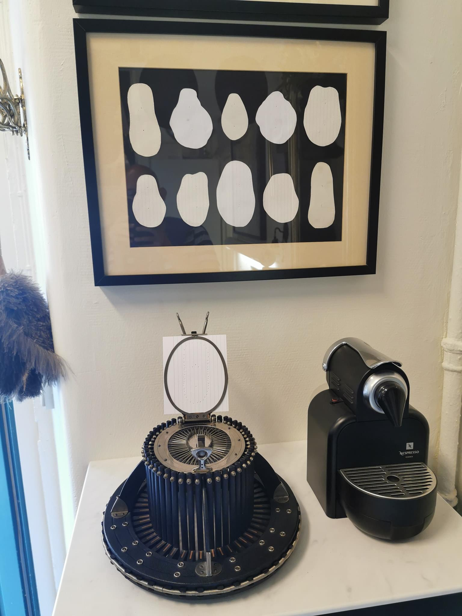 En konformatör, inklusive ett nytaget huvudmått i den uppfällda hållaren, hos Lisa Franzéns Hattmakeri i Göteborg. Tavlan på väggen bakom visar 10 exempel på olika personers huvudmått. (Apparaten till höger är en kaffebryggare.)